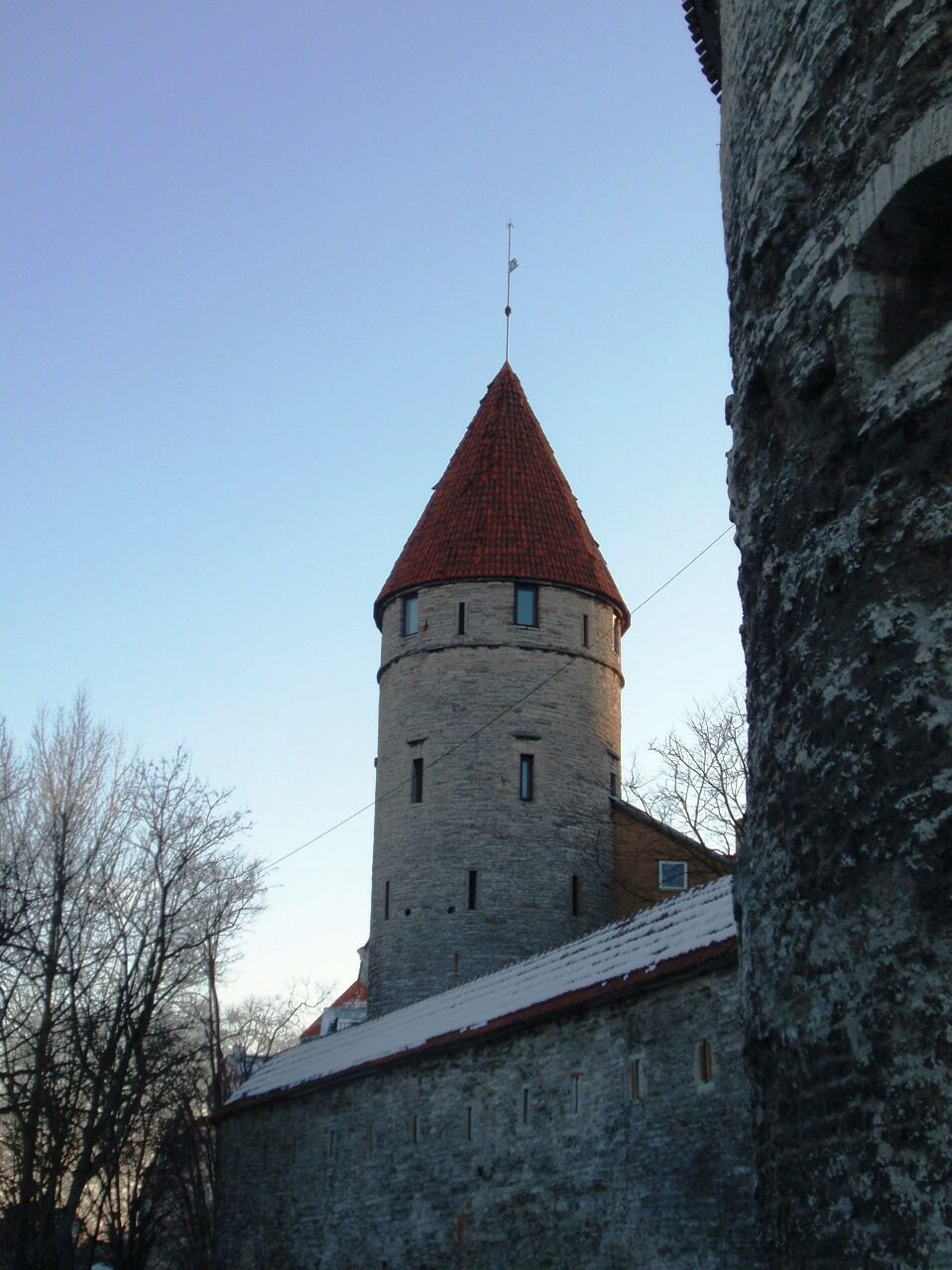 Stoltingi torn Tallinna linnamüüris.